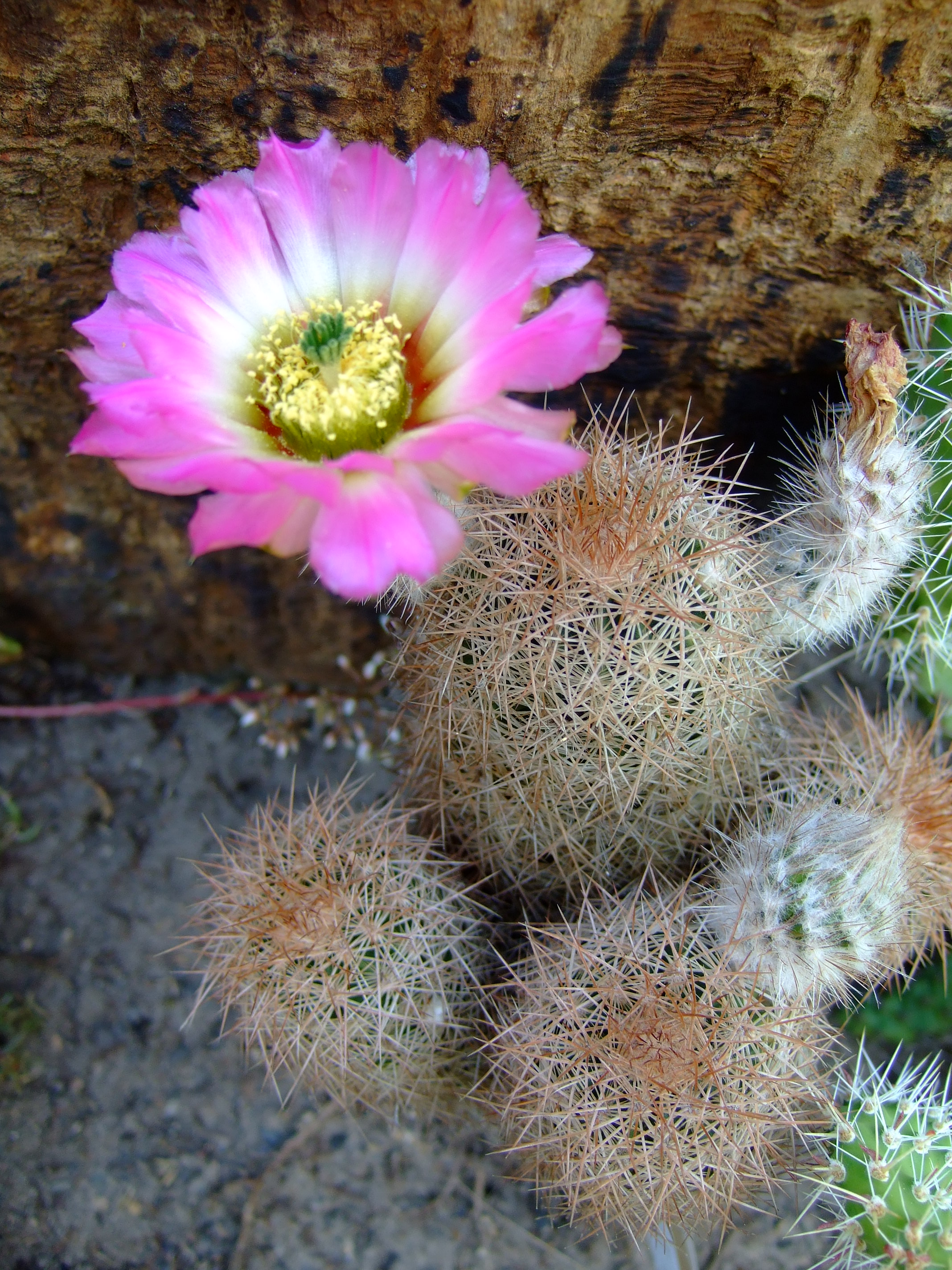 Echinocereus reichenbachii ssp. baleyi (File name misspelled!)